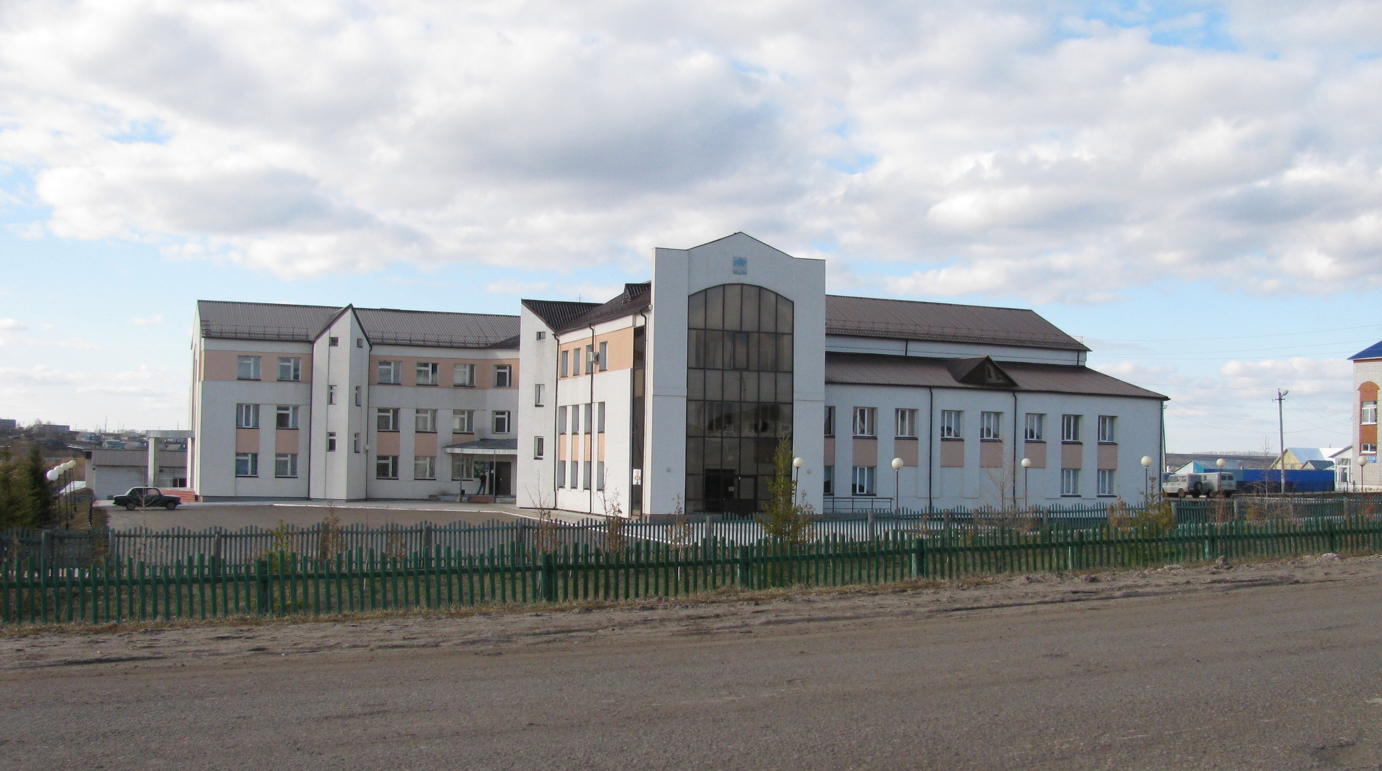 Здание_администрации_в_Больших_Кайбицах